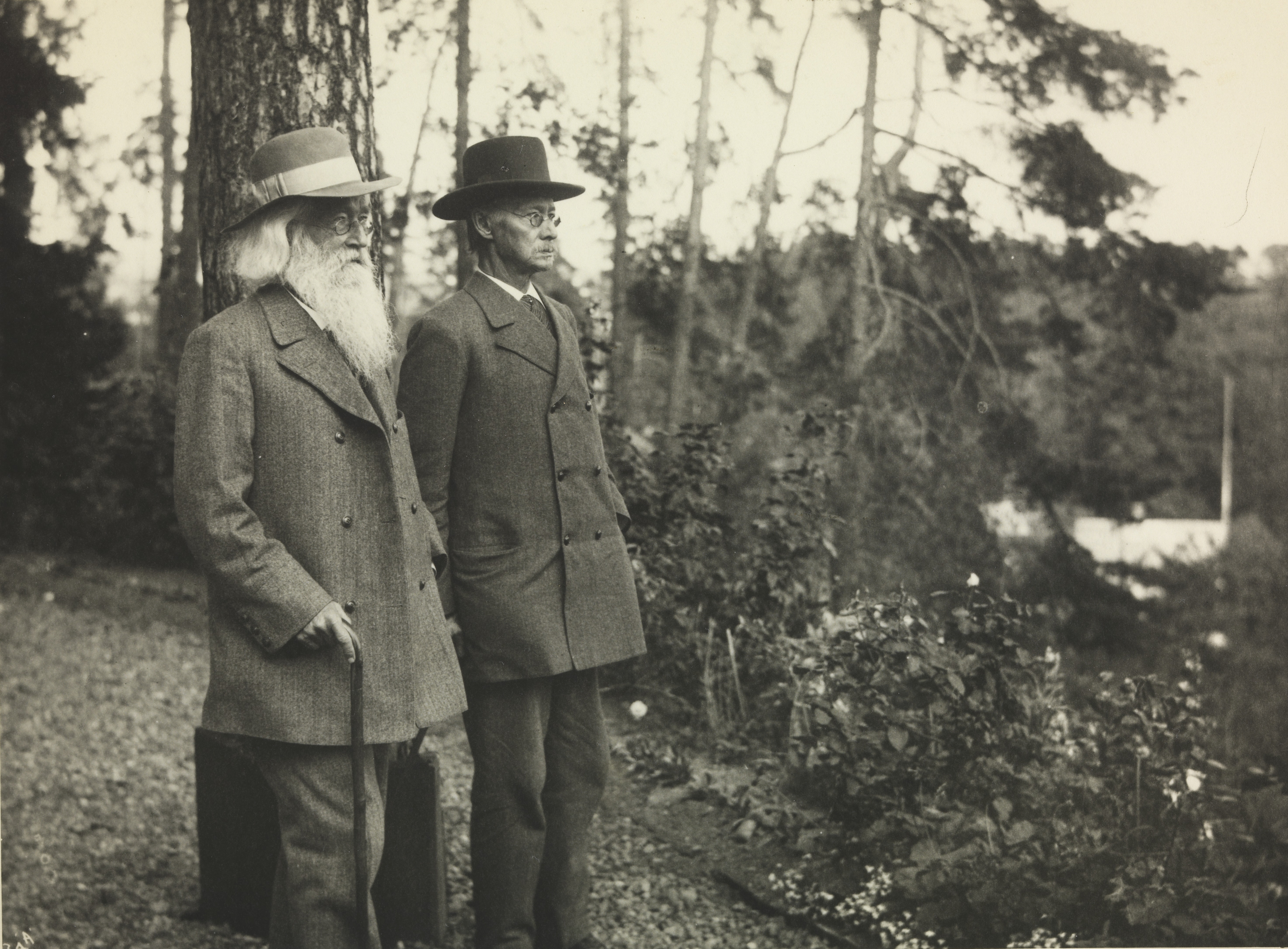 Eva Nansens brødre på spasertur. Fra venstre Ernst Sars, historiker og Georg Ossian Sars, zoolog. Depicted person: Sars , Ernst (1835-1917) Depicted person: Sars, Georg Ossian (1837-1927) Depicted place: Akershus, Bærum